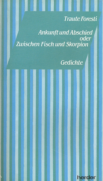 Traute Foresti: Ankunft und Abschied oder Zwischen Fisch und Skorpion. Gedichte. Basel, Wien: Herder 1992.